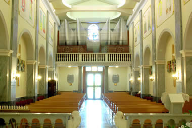 Santuario di Montefalcone di Val Fortore. Foto scattata da Lorix78, pubblico dominio.